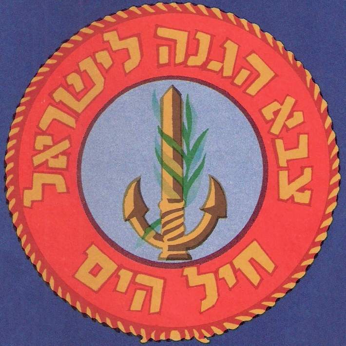 סמלי אוניות חיל הים